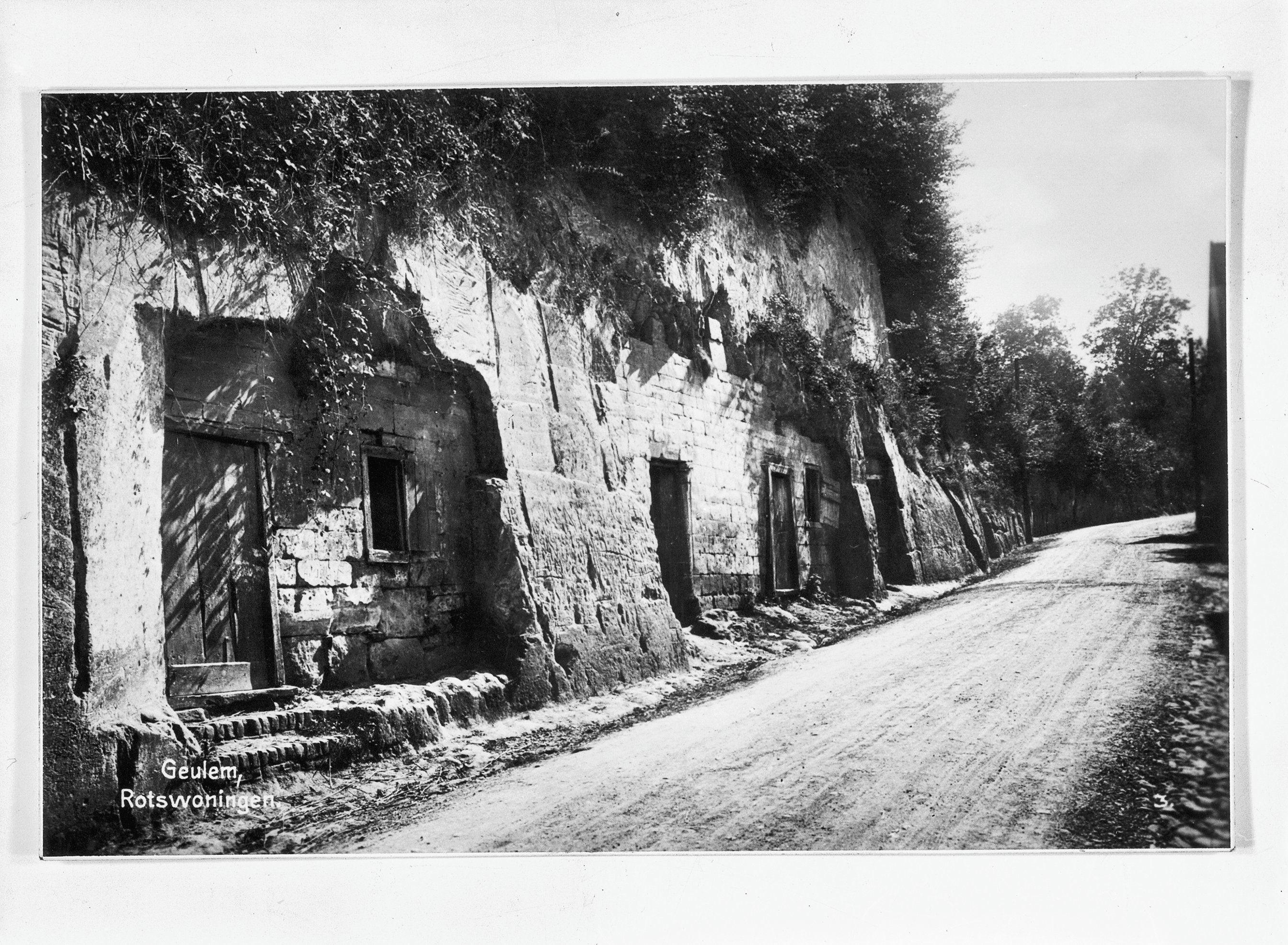 Diversen: rotswoningen, reproductie van oude foto